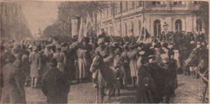 Вілськові демонстрації в Києві їколо думи) після проголошення III. Універсалу Ценірадьної Ради